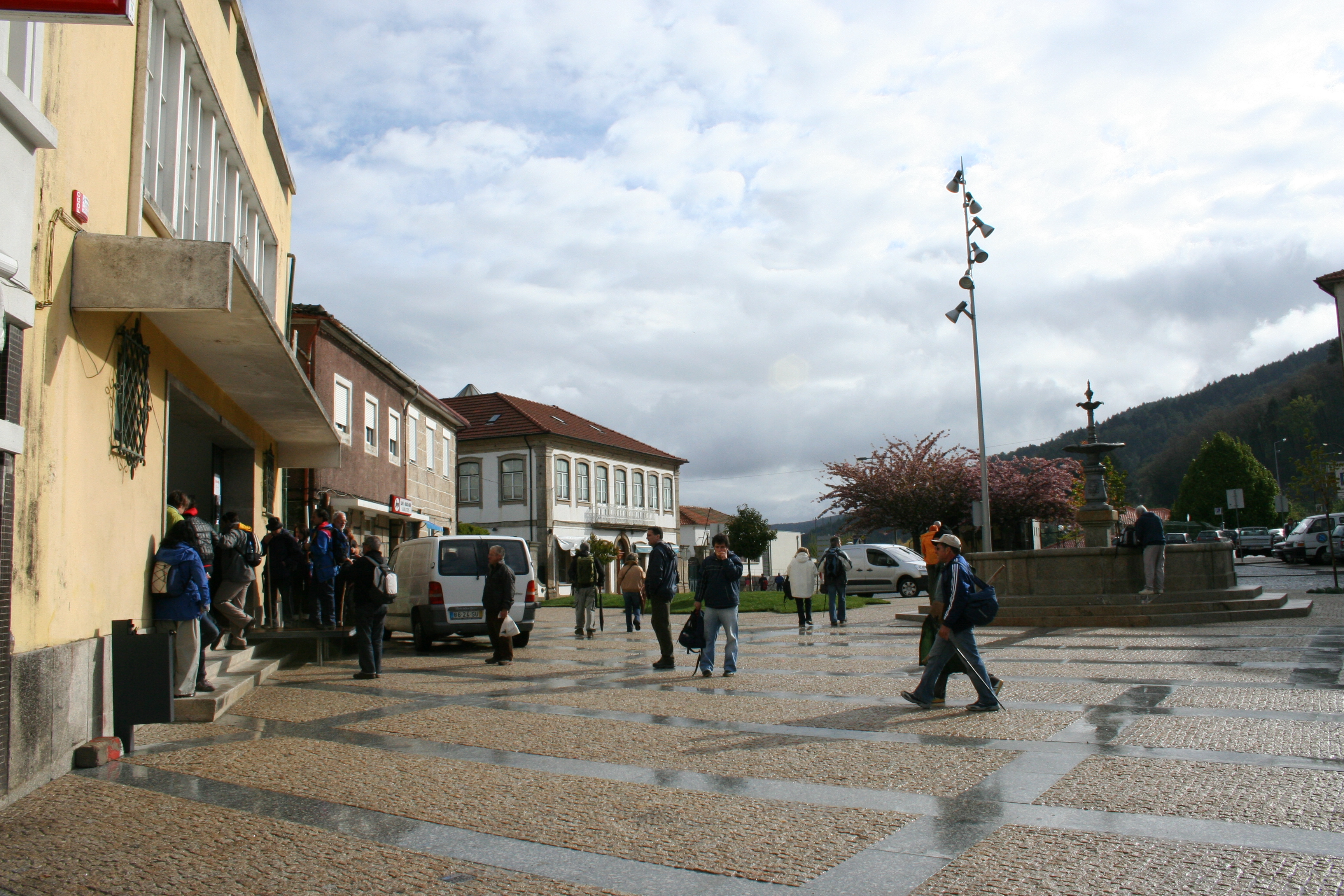 Núcleo urbano de Vila Pouca de Aguiar This file was uploaded for Wiki Loves Monuments in Portugal with the unique identifier 97027955.